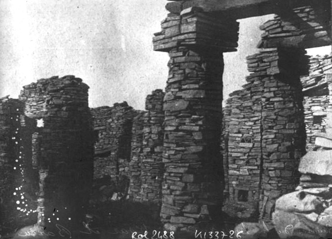 Ruines de la mosquée de Ksar el Barka (Mauritanie)